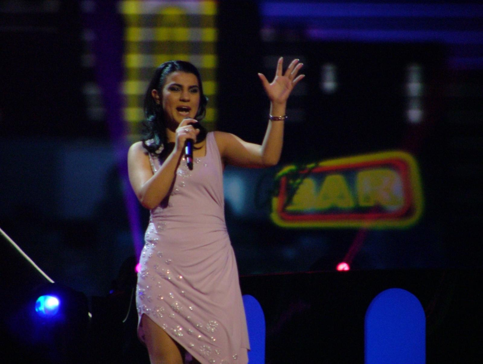 El debut d'Albània